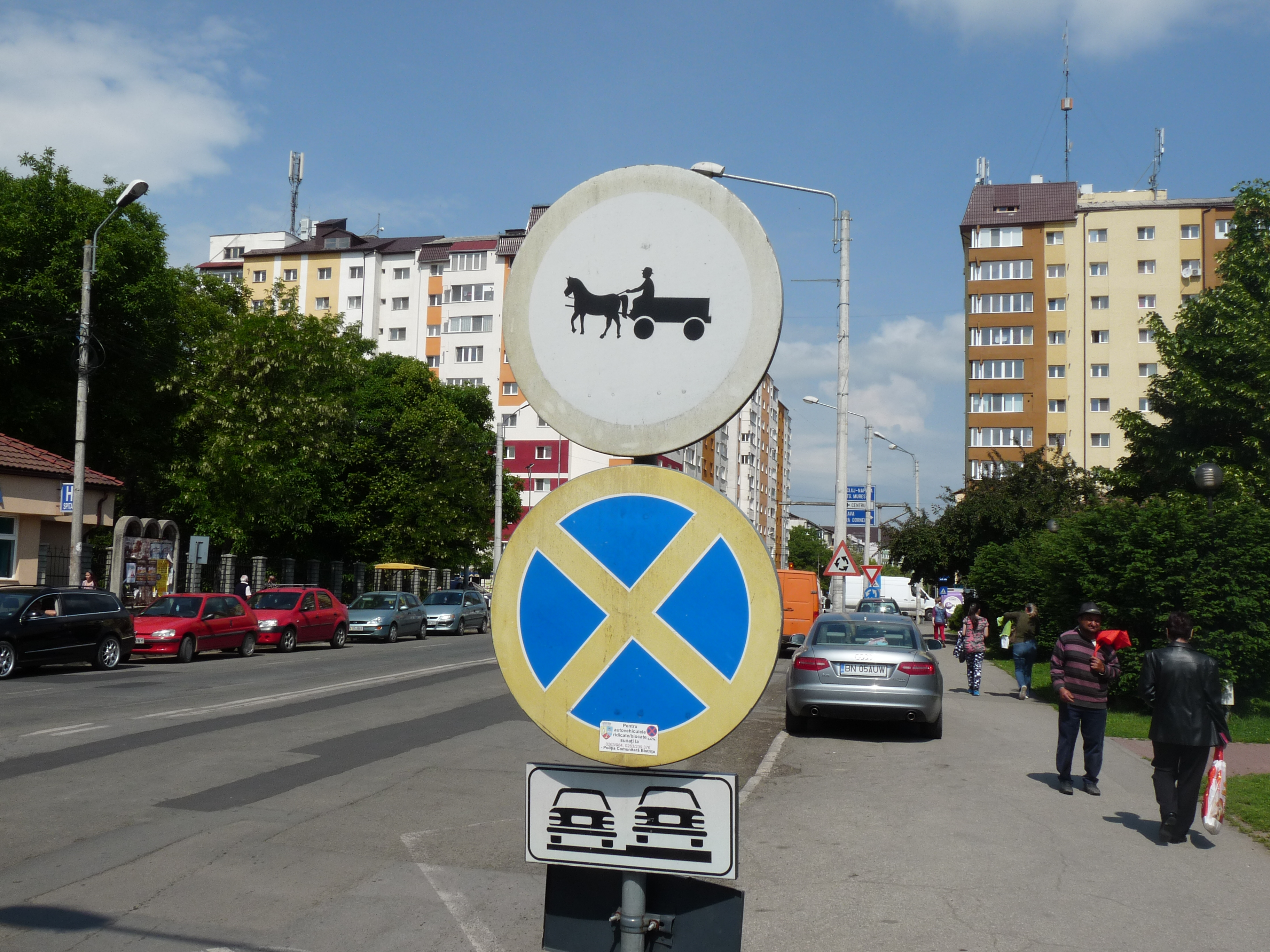 Een verkeersverbod in de stad Bistrița